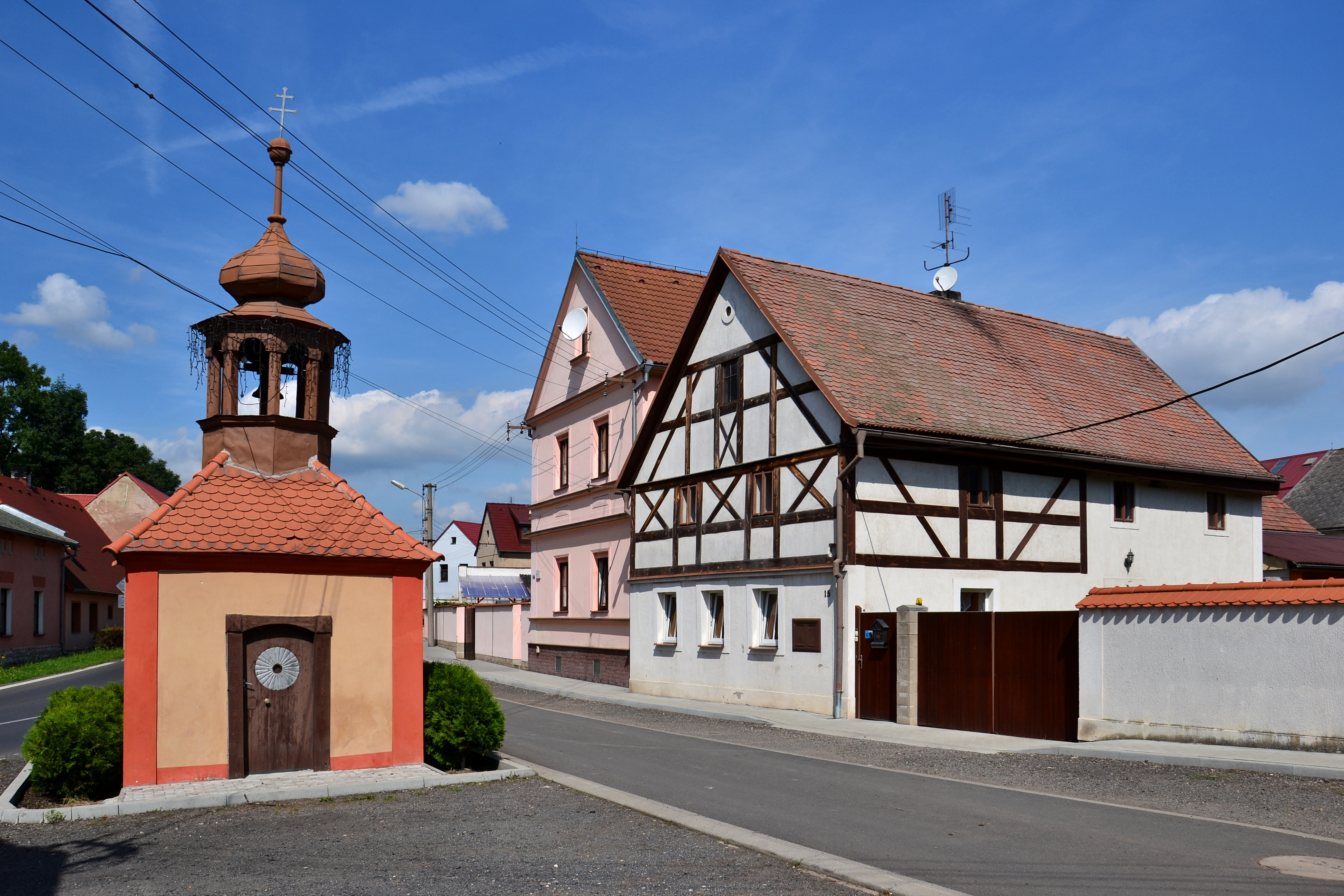 Pětipsy - náves s kaplí